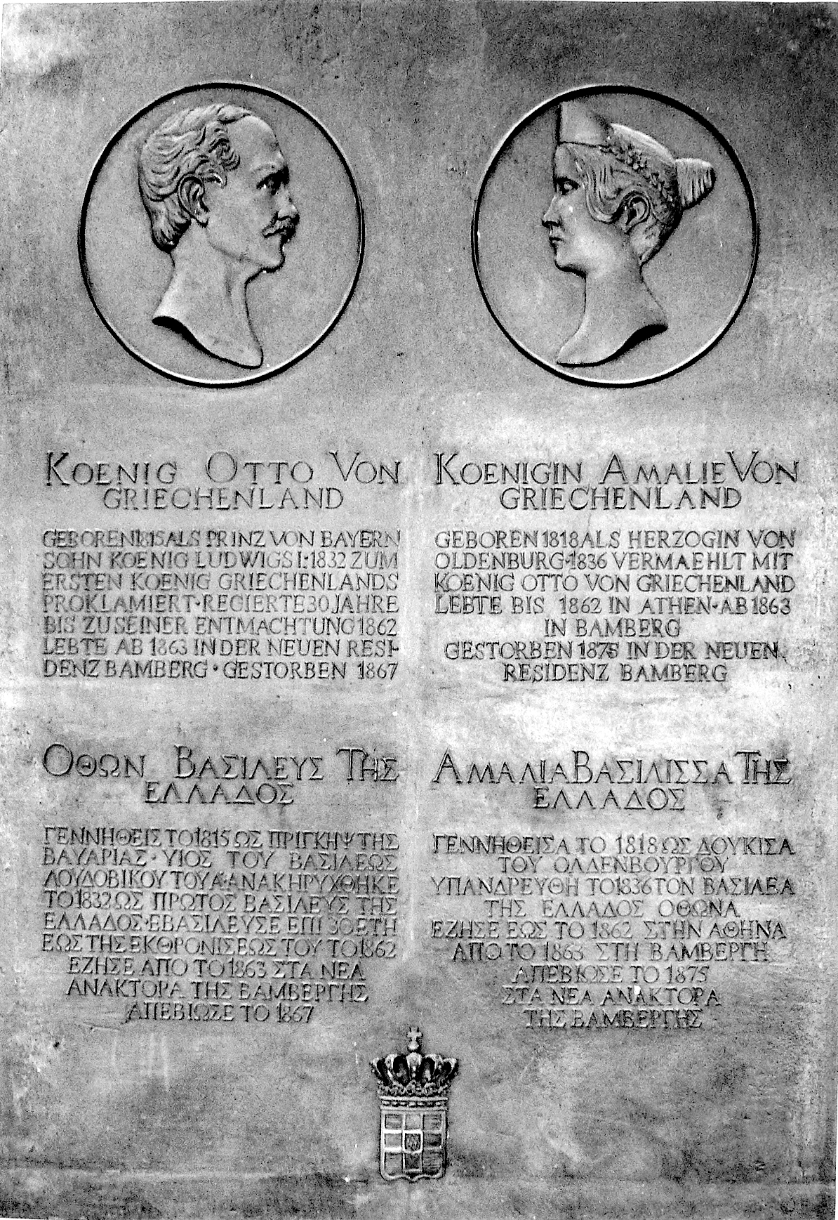 Gedenktafel für König Otto von Griechenland im Rosengarten Bamberg